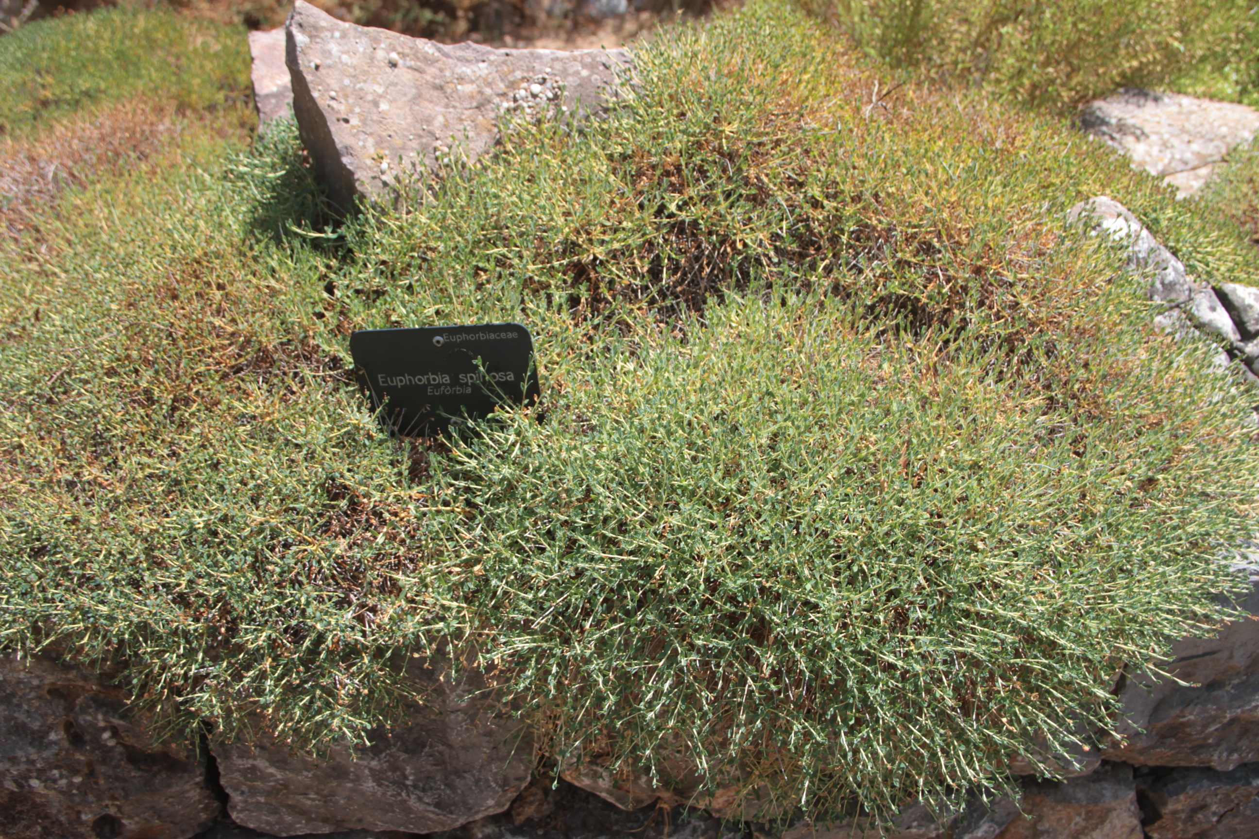 Euphorbia spinosa. Сольєрський ботанічний сад